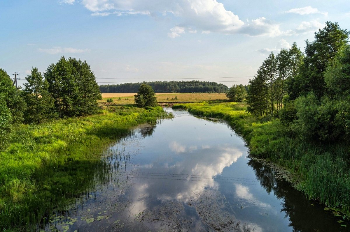 Малышкі. Рака Сэрвач